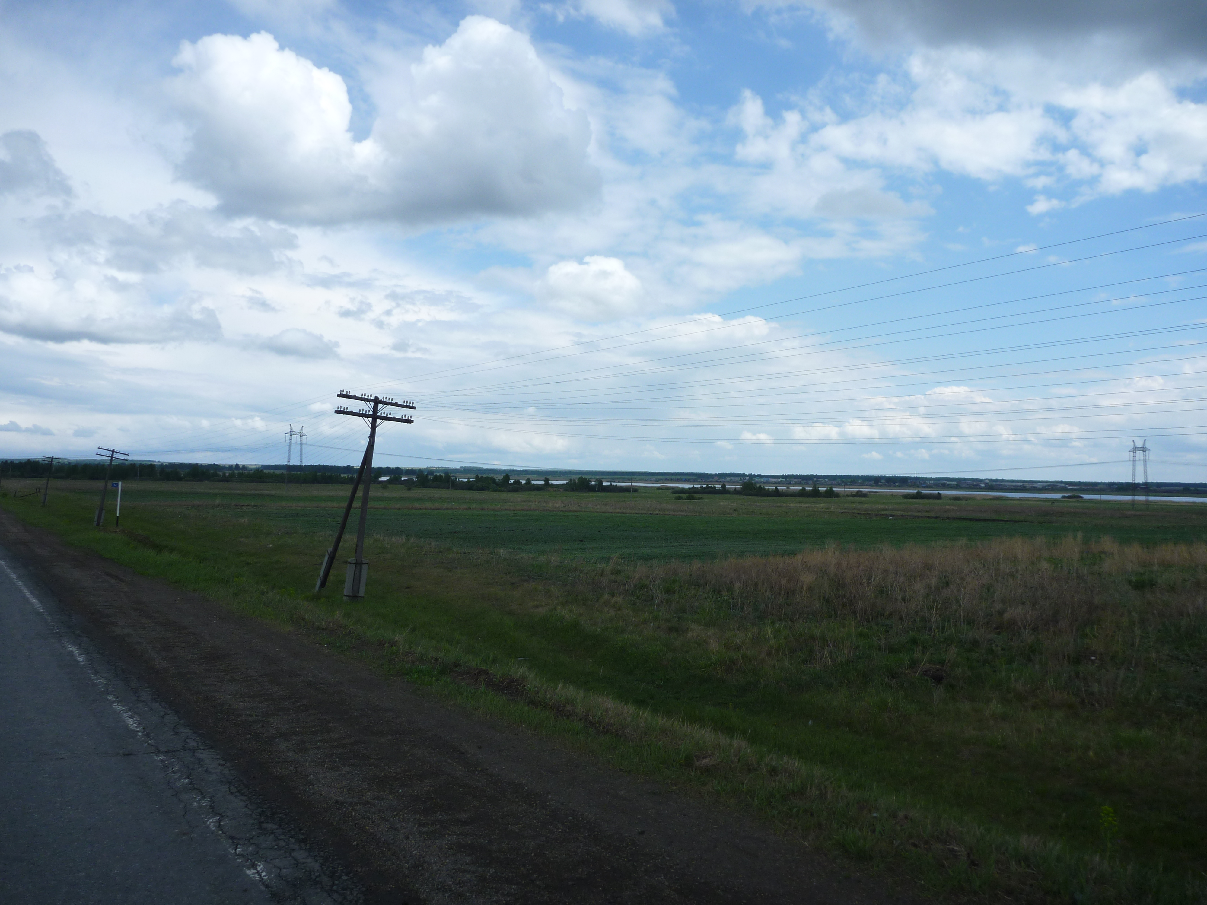 Kirzhakul', Chelyabinskaya oblast', Russia, 456508